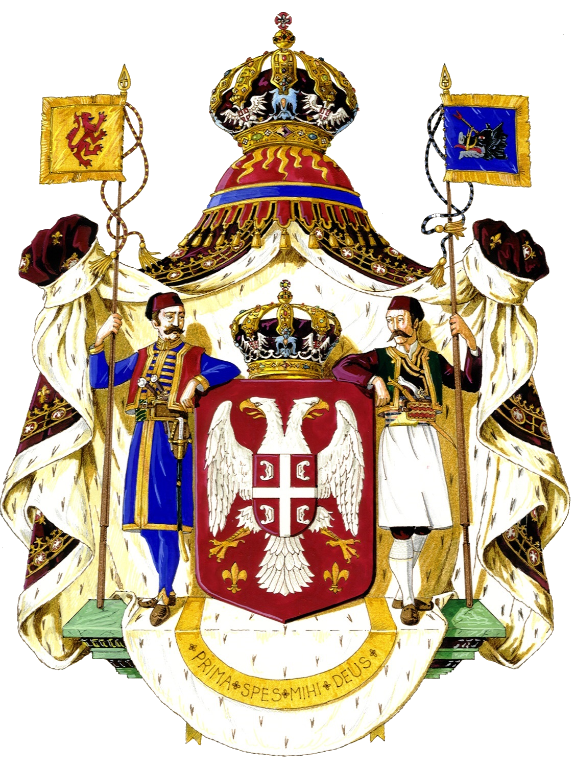 Coat of arms of the Karadjordjevic dynasty